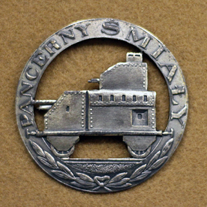 Odznaka pociągu pancernego "Śmiały"